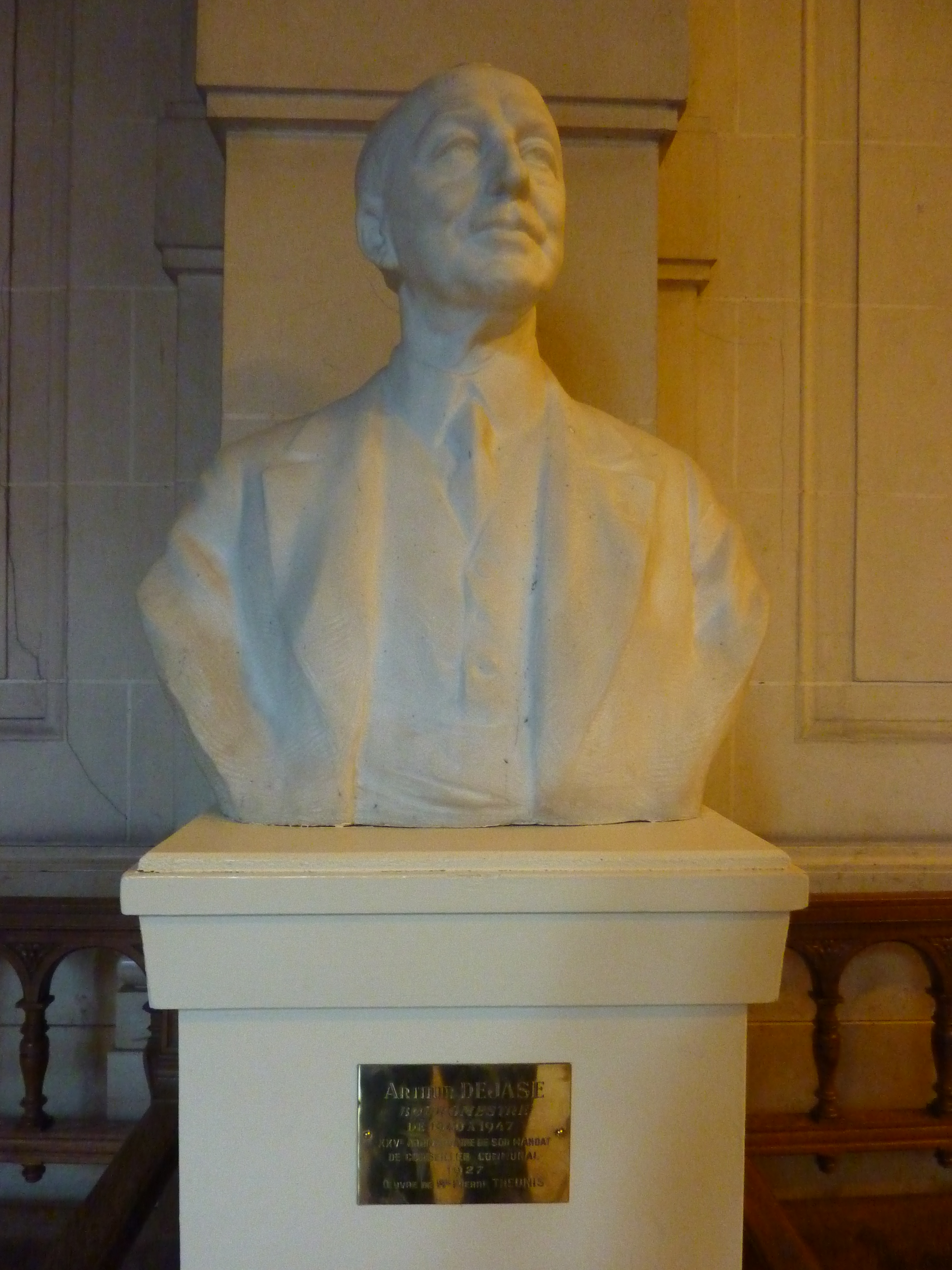 Buste d'Arthur Dejase (Œuvre de Pierre Theunis).